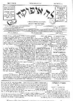 Главата на вестник "Епока" (1875 - 1912).